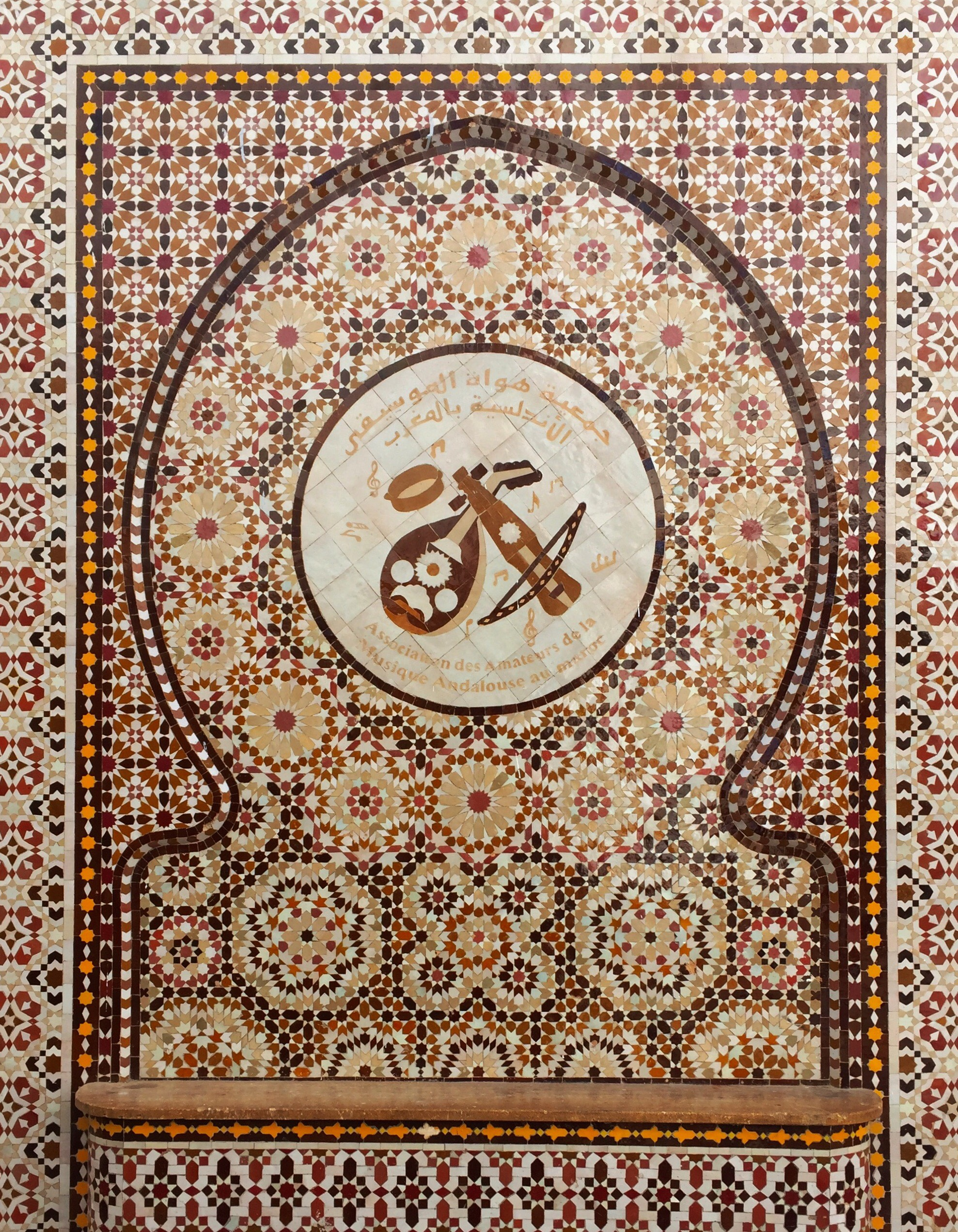 لوحة زليج خارج دار الآلة الموقعة في حي الحبوس بمدينة الدار البيضاء المغربية